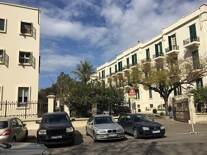 Vue du couvent des fransiscaines à Badaro - beyrouth